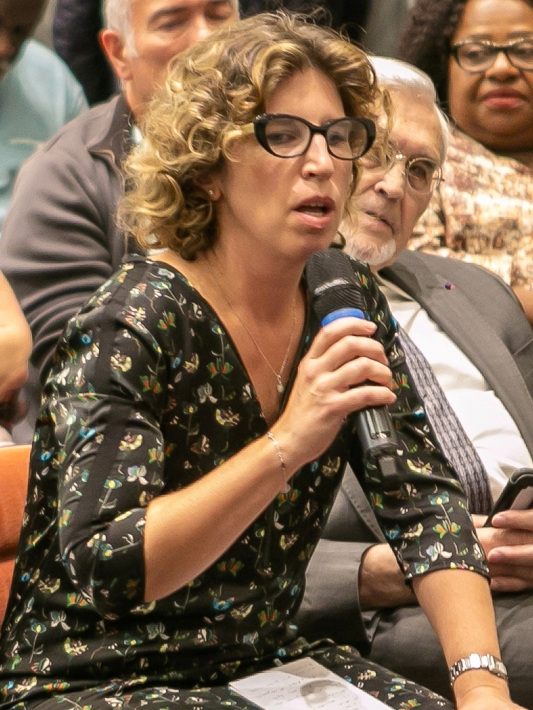 Marie Guévenoux, le 9 octobre 2018 à Evry, lors de la conférence de presse de Francis Chouat à Evry / Evry, Essonne, France